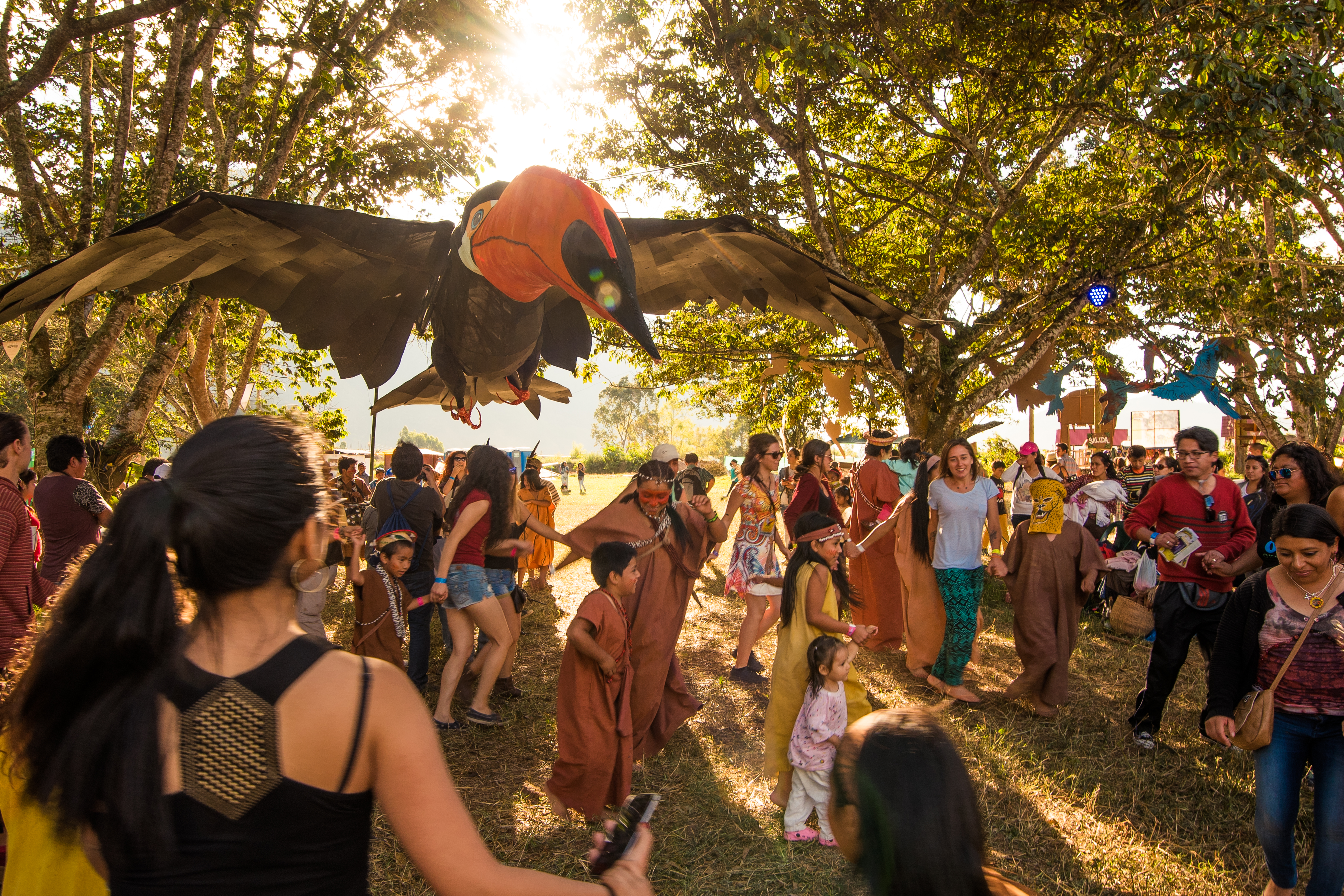 Ejemplo de arte plástica en el Festival Selvámonos